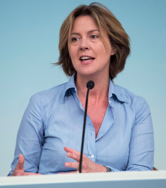 Ministra della Salute Beatrice Lorenzin